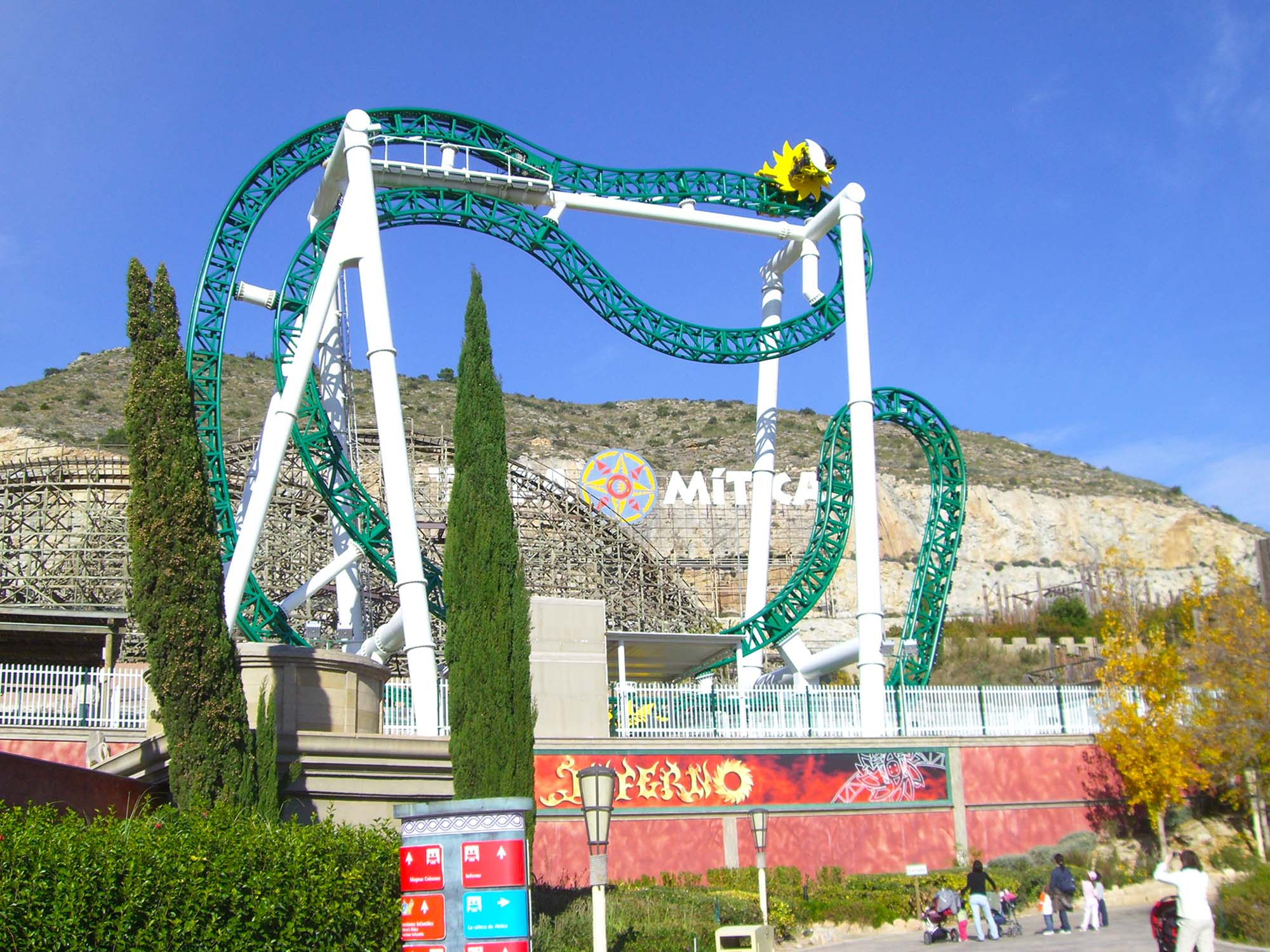 Montaña Rusa 4D en Terra Mítica